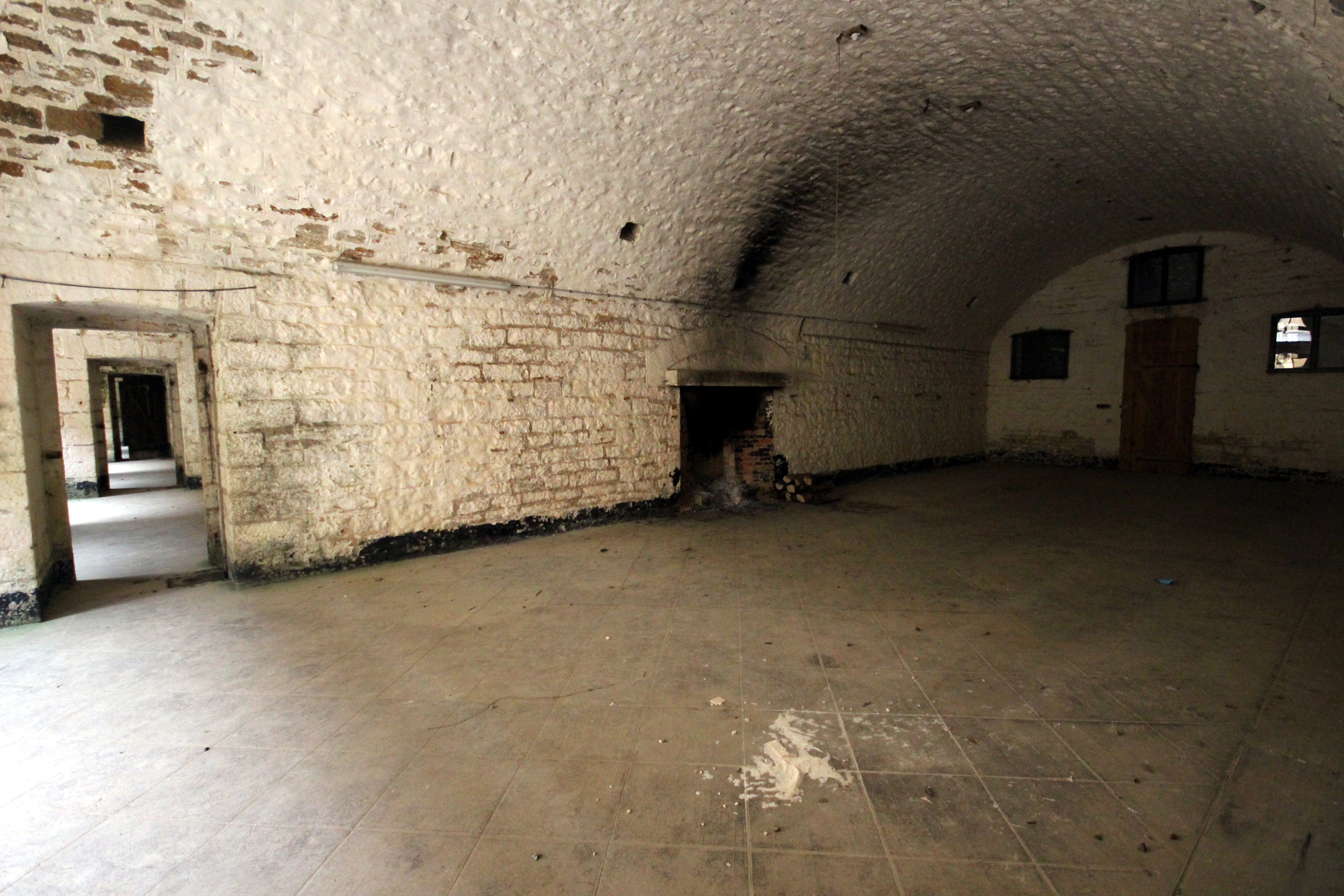 Une chambrée de troupe avec le couloir du fort du cognelot